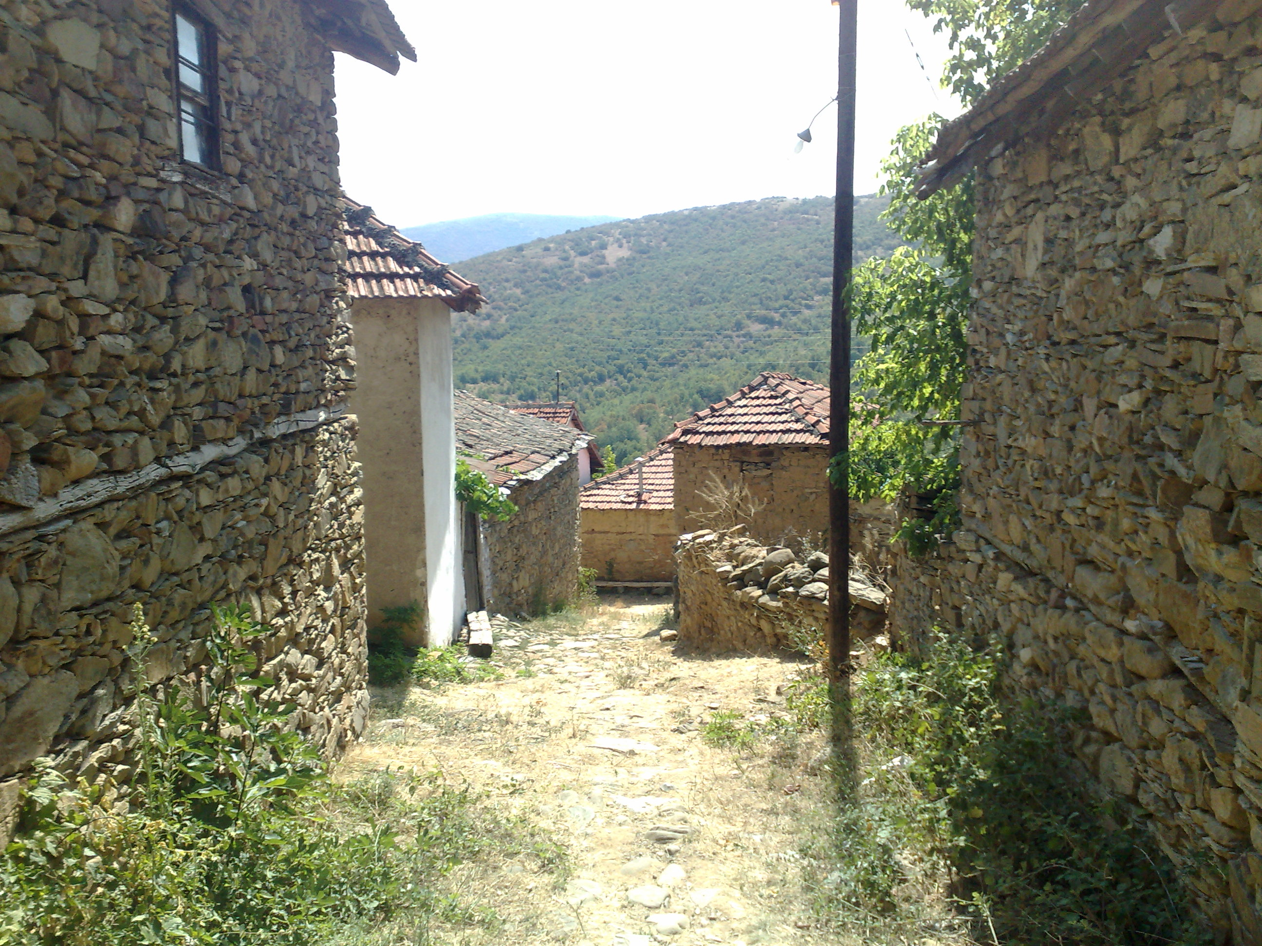 Улица (сокак) во село С'лп